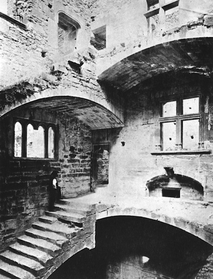 Foto della rampa dello scalone del Castello di Verrès, Valle d'Aosta, Italia. Foto di fine Ottocento - inizio Novecento selezionata prima del 1942 da Carlo Nigra (1856-1942).